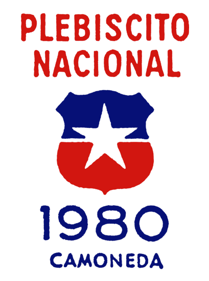 Sello adhesivo utilizado en el plebiscito nacional de Chile de 1980 para marcar las cédulas de identidad de los votantes que ya sufragaron.